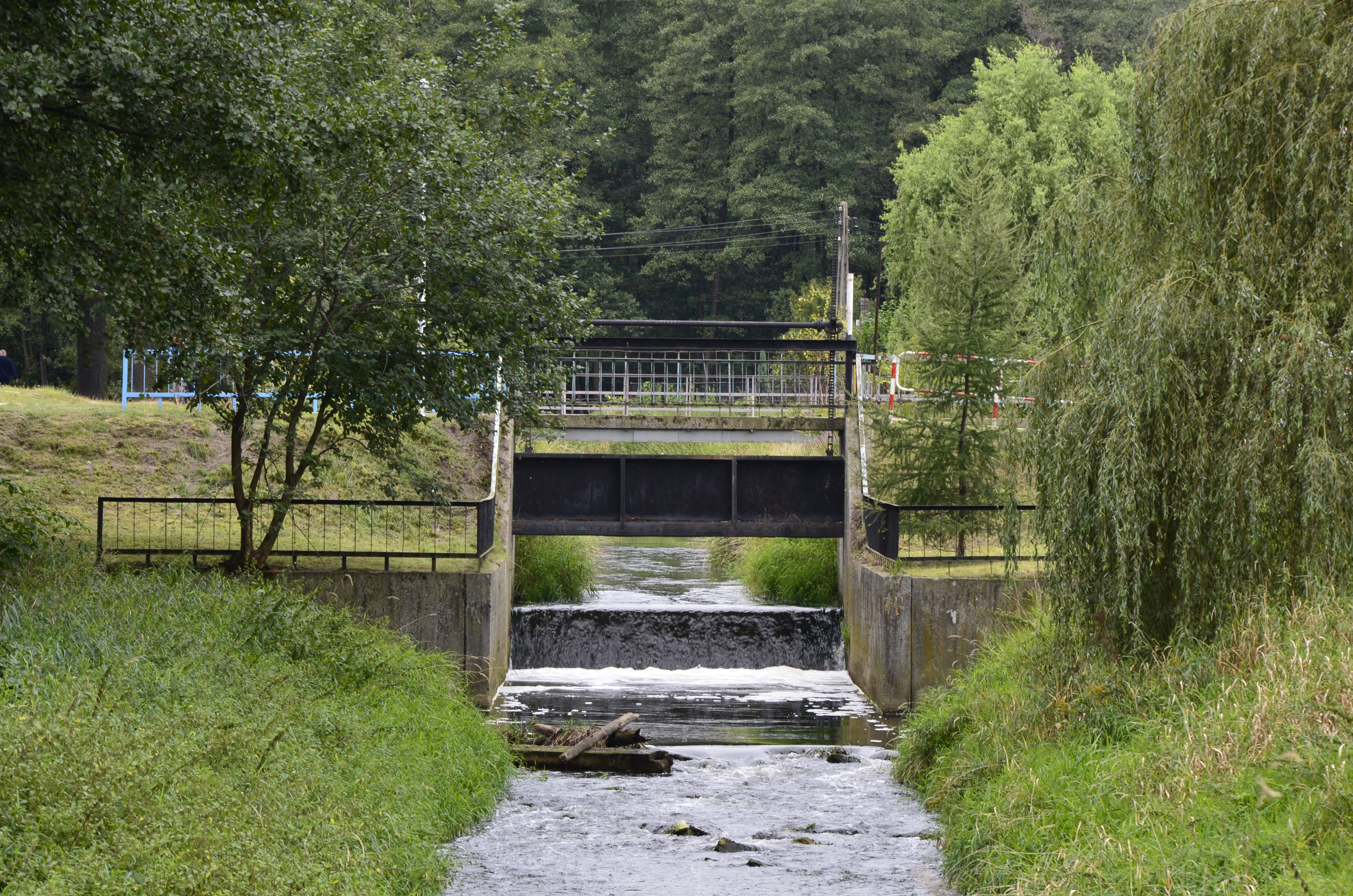 Zespół zabudowy Huty Paprockiej tama wraz z przejściem nad nią